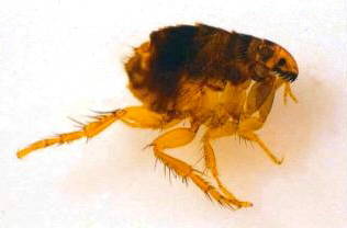 eigen werk, kattevlo (microscoop)